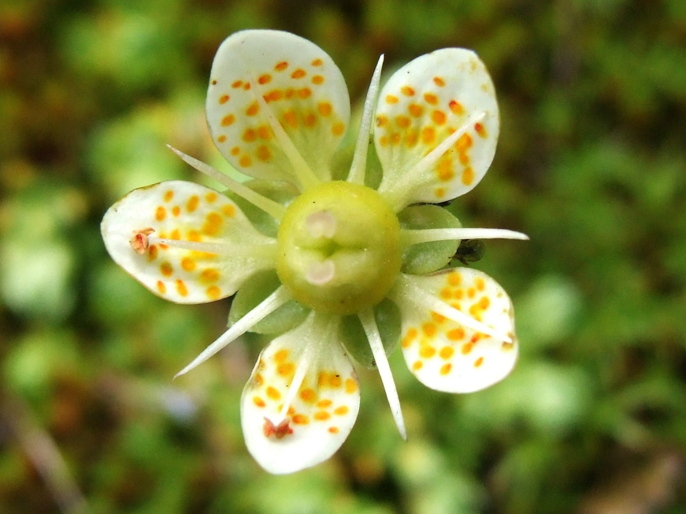 Saxifraga bryoides (pl. skalnica mchowata), habitat: West Tatra Mountains, Banikov